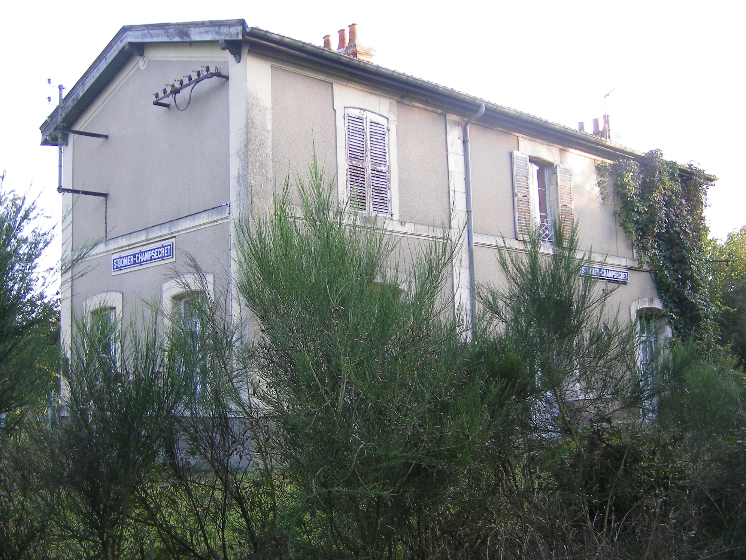 Gare de Saint-Bomer - Champsecret en août 2007